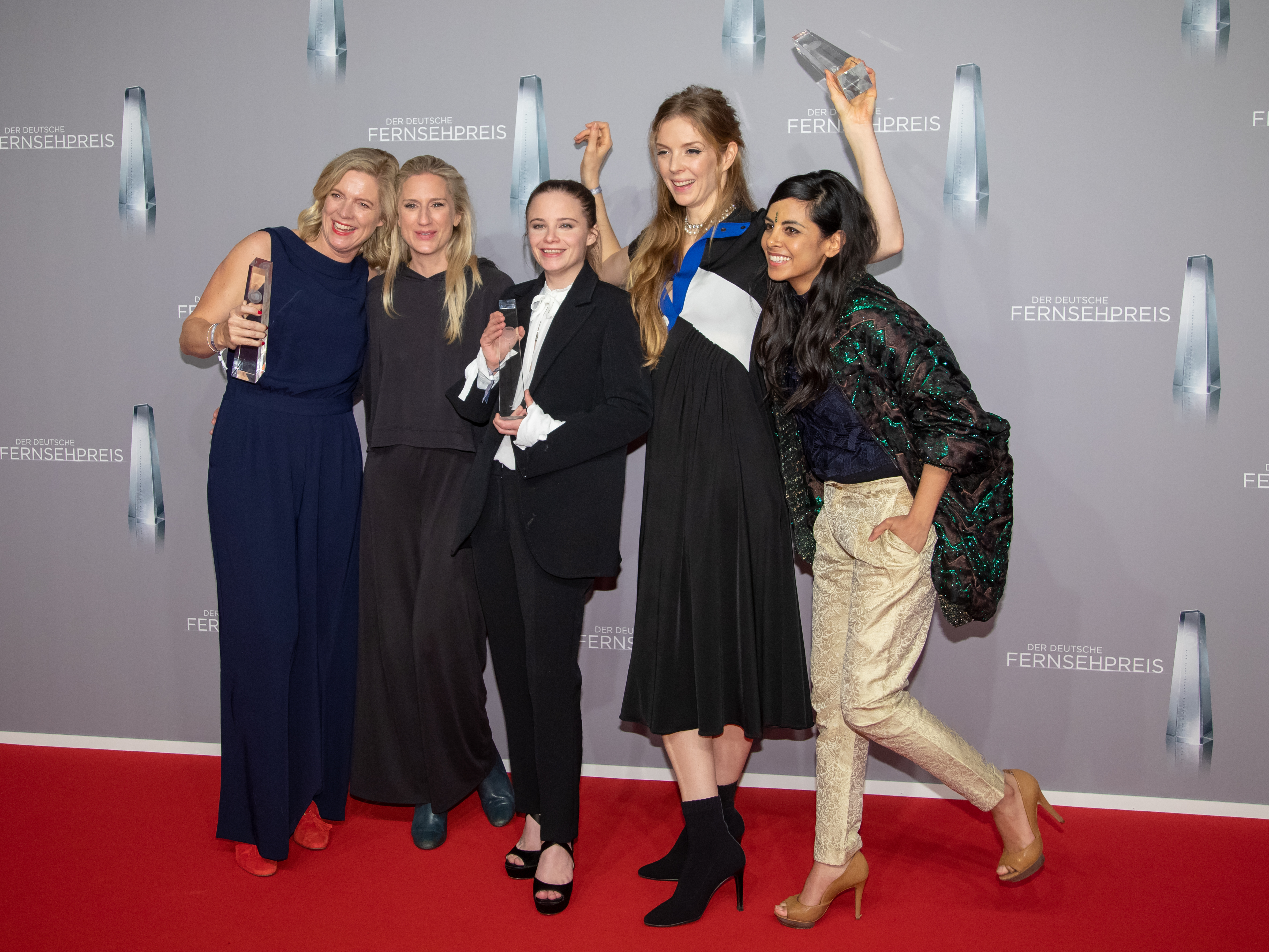 Jerks - Cast beim Deutschen Fernsehpreis 2019 in der Düsseldorfer Rheinterrasse